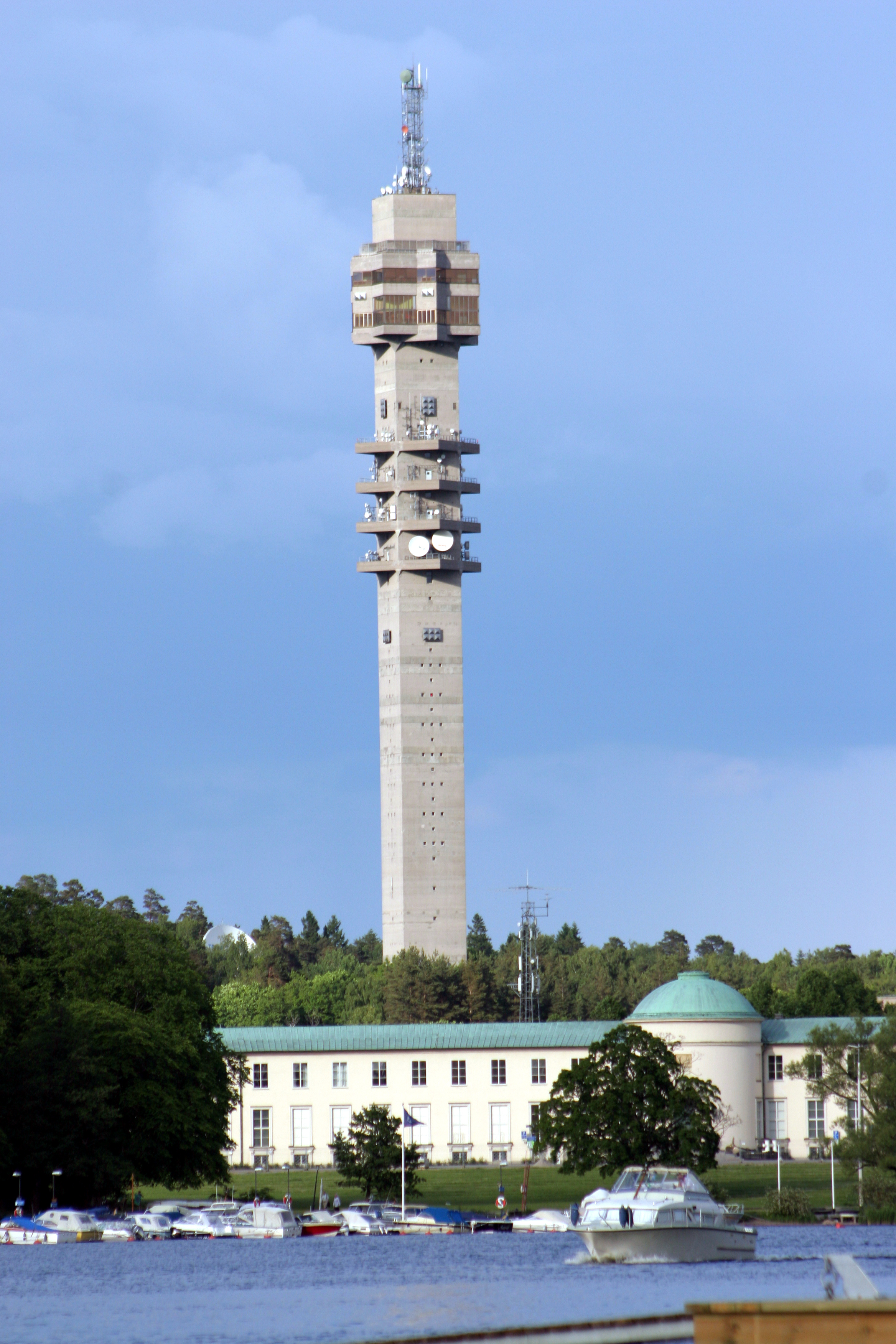 Kaknästornet, Stockholm, Sweden. Height:155 m. Picture taken from Djurgården.